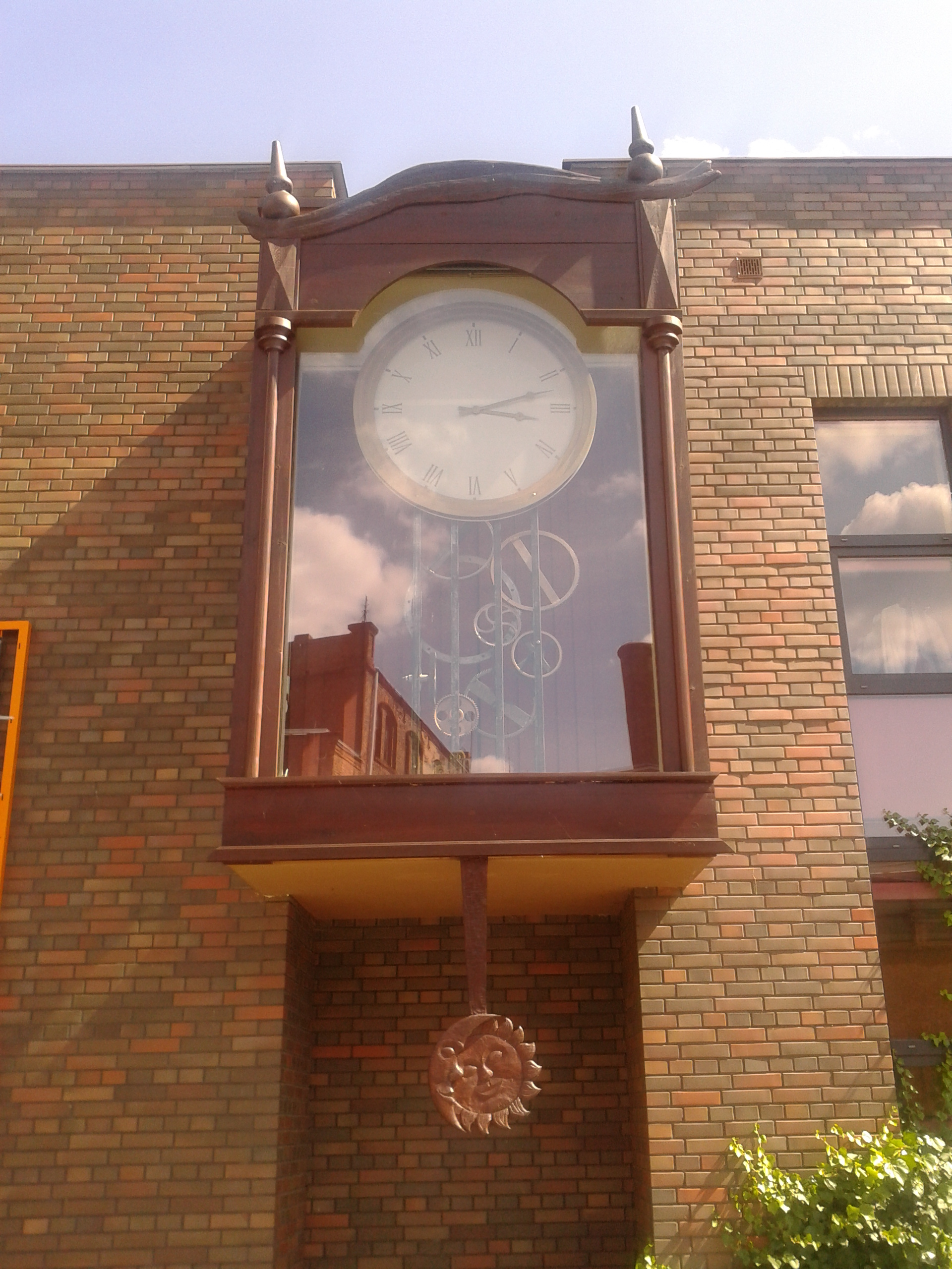 Zegar na Baju Pomorskim w Toruniu